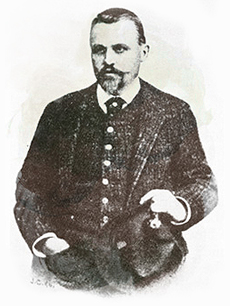 Henrik Åberg